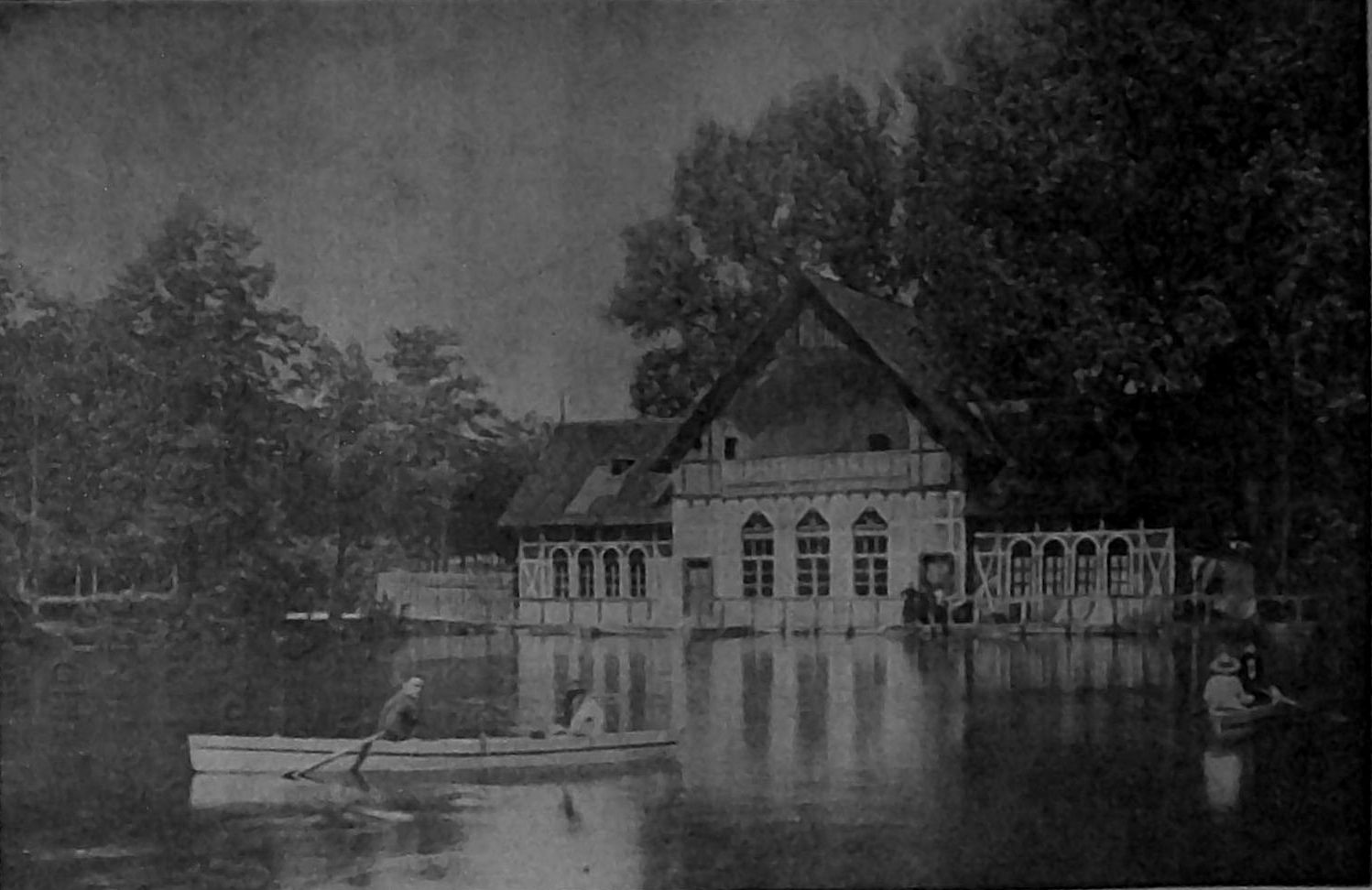 Lučenecký park v roku 1925